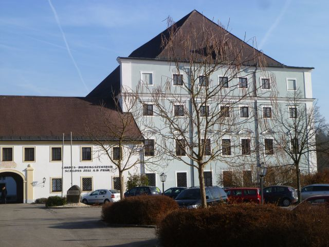 Schloss Zell an der Pram: Seitenansicht